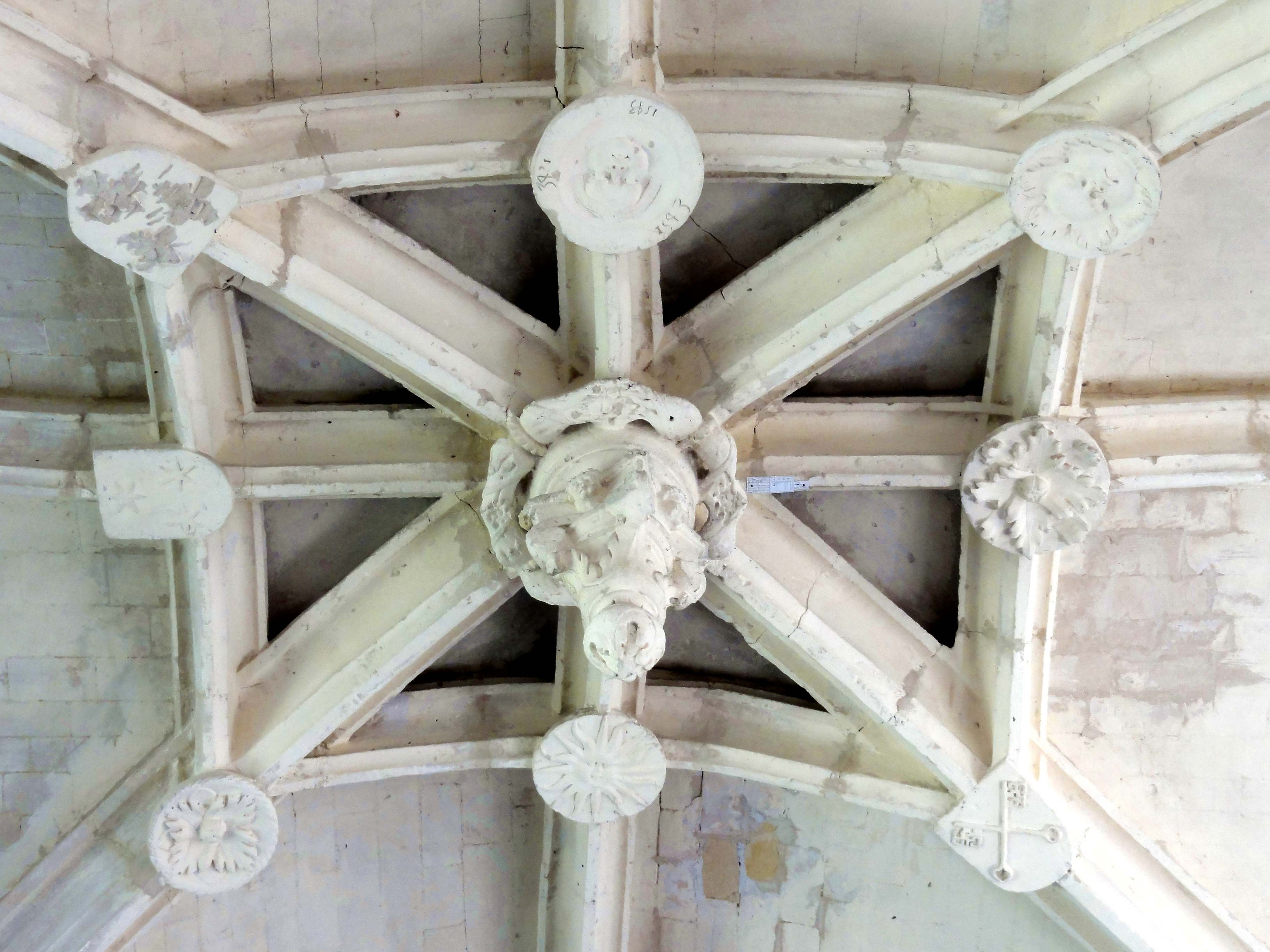 Clé de voûte (voir titre).